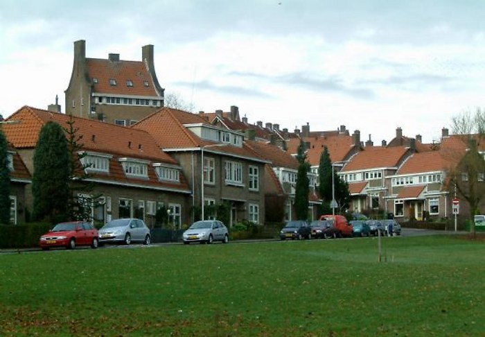 Foto van de wijk Geitenkamp in Arnhem